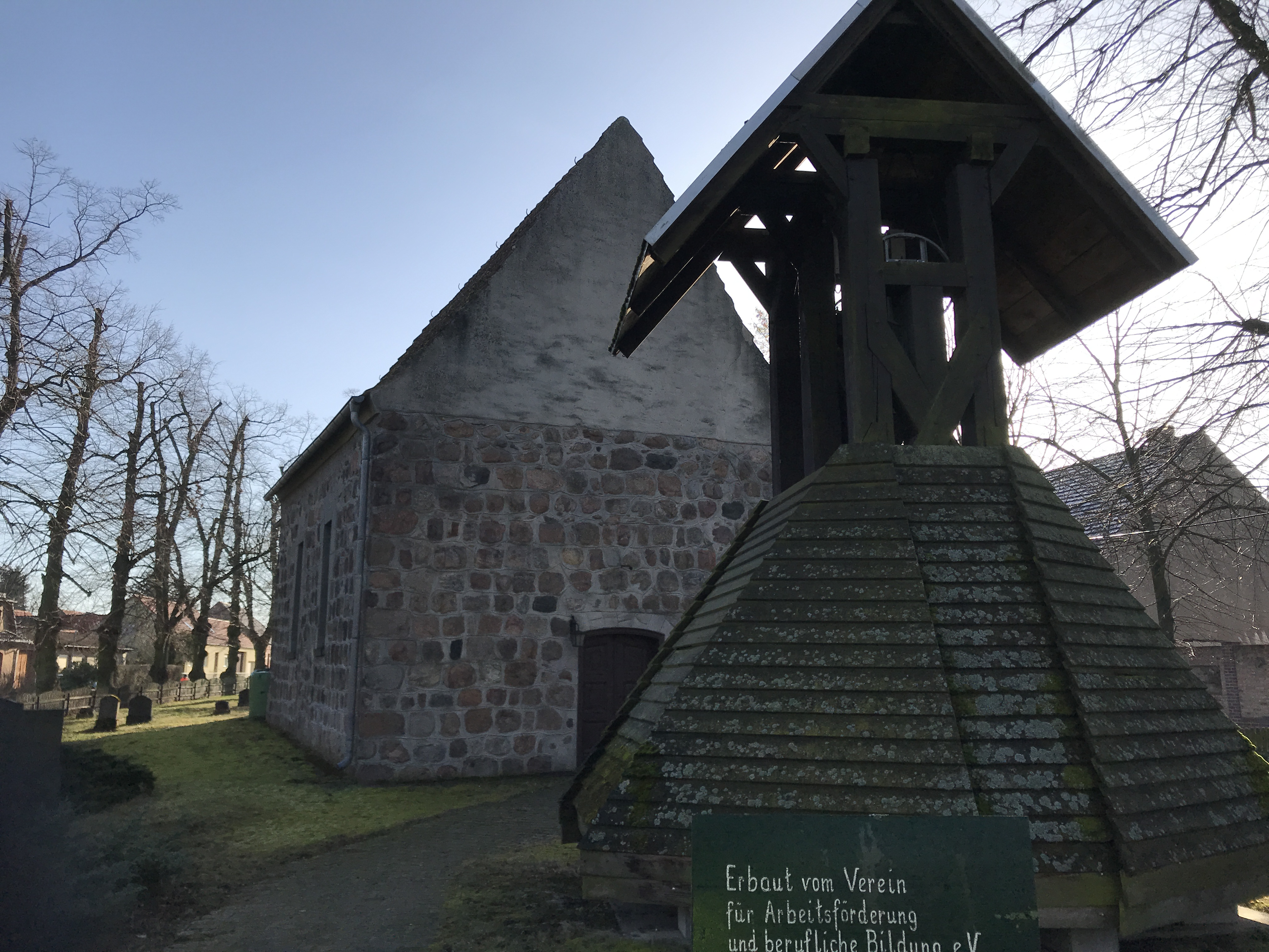 Spätromanische Kirche in Niebendorf, Dahme/Mark in Brandenburg